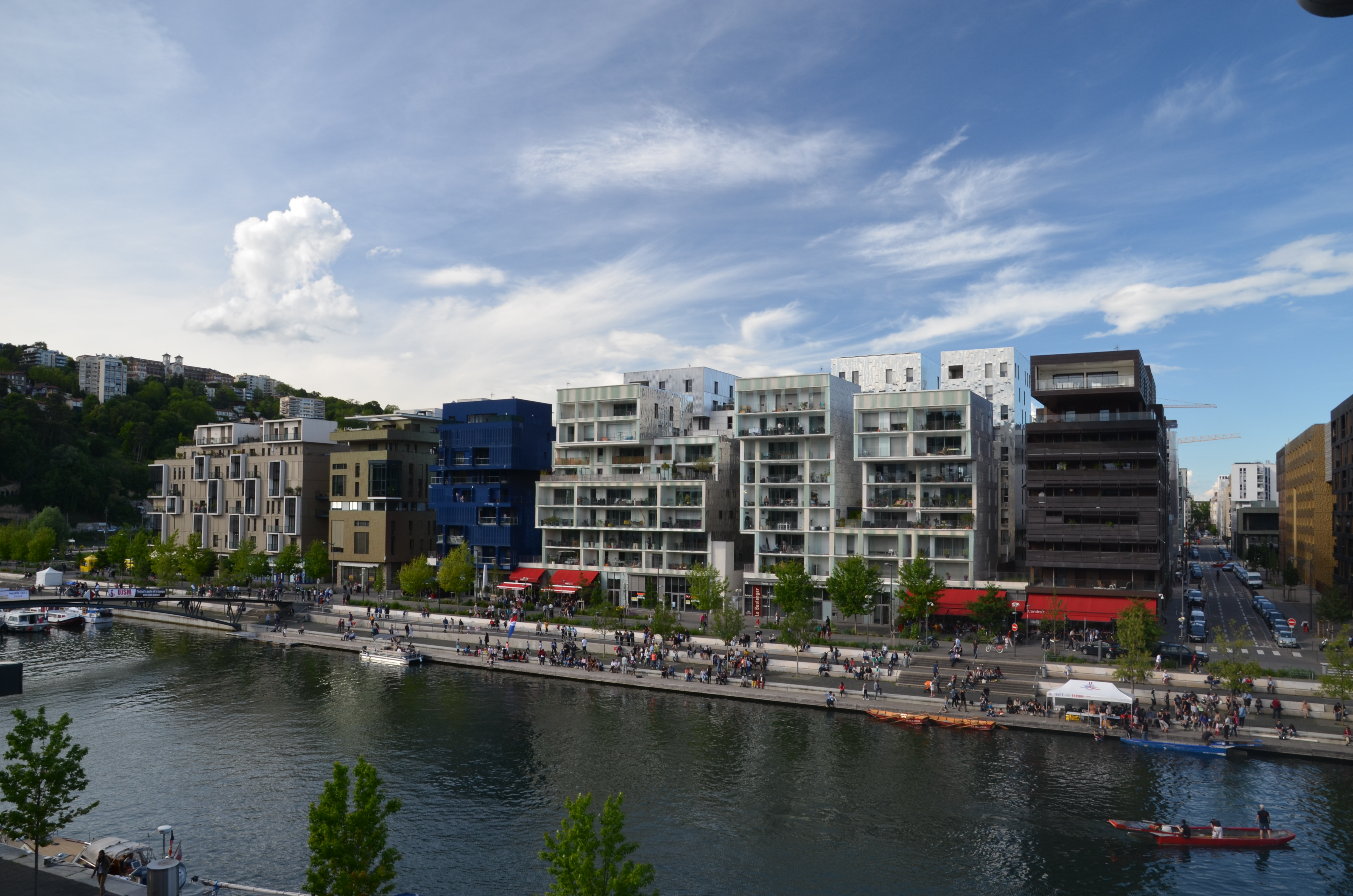 Moderne Wohnhäuser am Quai Antoine Riboud im neuen Stadtteil La Confluence in Lyon